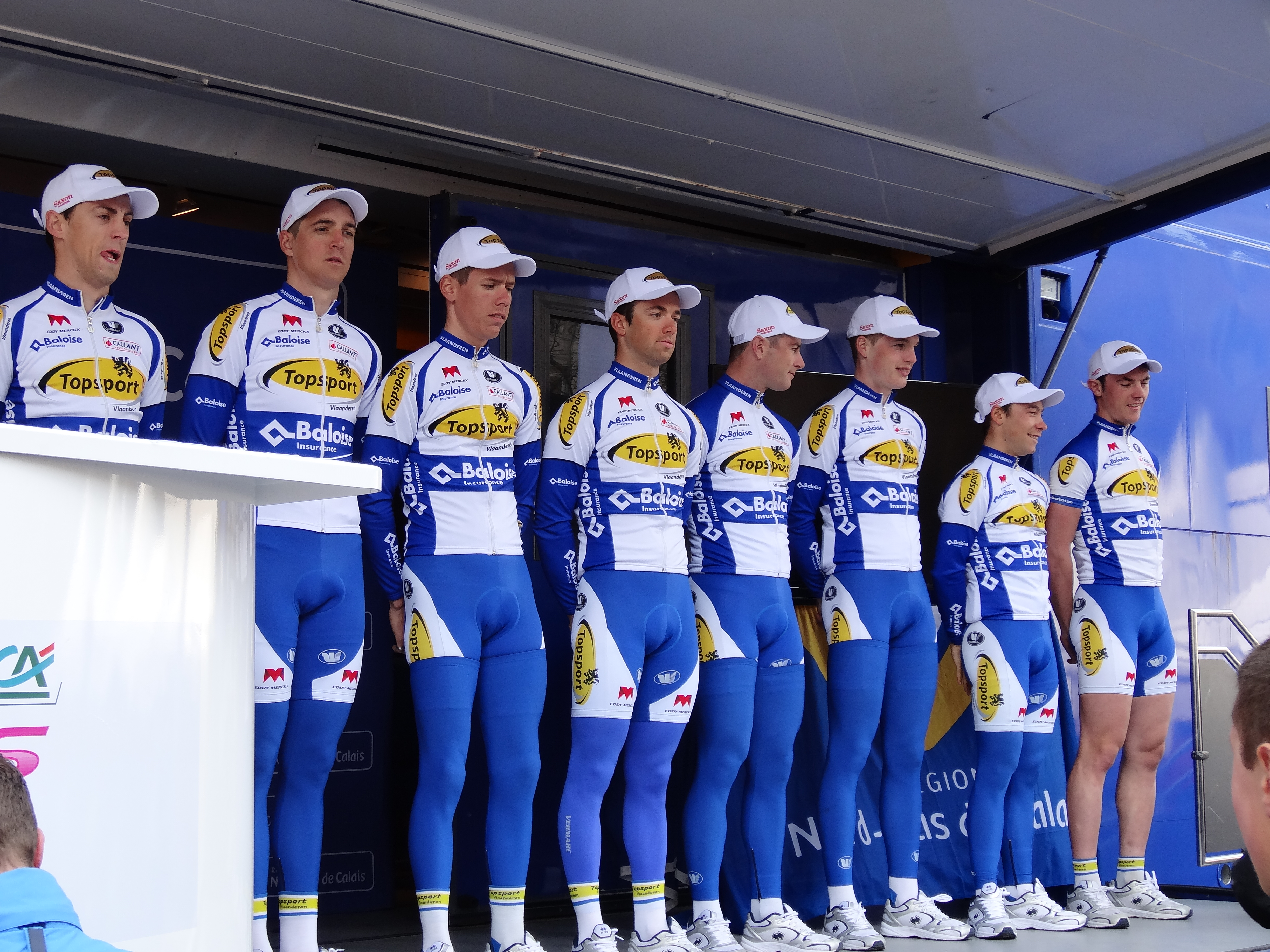 Reportage photographique réalisé le mercredi 1er mai 2013 au départ de la première étape de l'édition 2013 des Quatre jours de Dunkerque à Dunkerque, Nord, Nord-Pas-de-Calais, France. Le dossier photographique montre des véhicules de course exposés, la caravane publicitaire, la présentation des coureurs, et le départ. Depicted people: Tim Mertens, Jarl Salomein, Kenneth Vanbilsen, Sven Vandousselaere, Tom Van Asbroeck, Gijs Van Hoecke, Michael Van Staeyen and Yves Lampaert